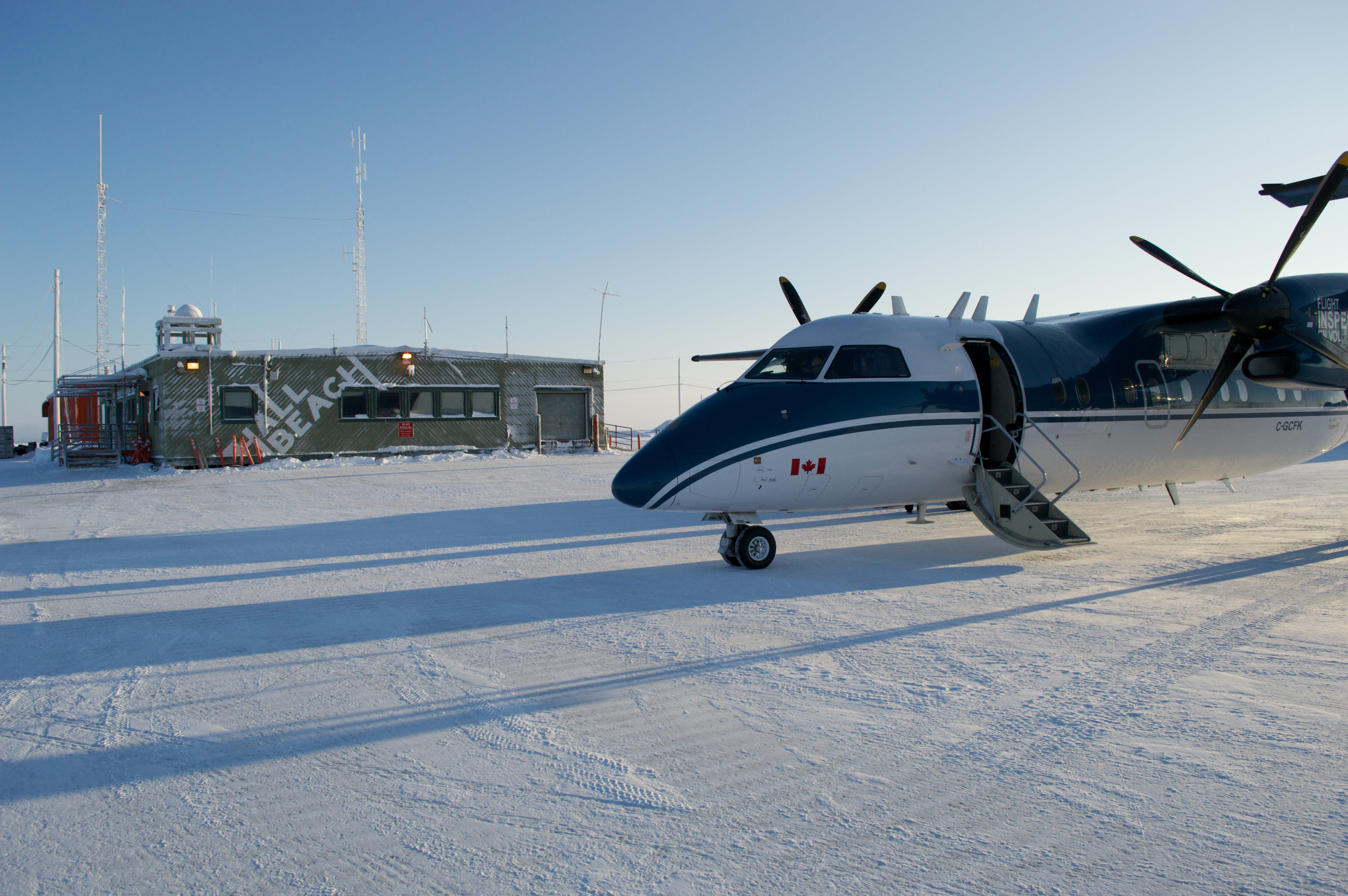 Hall Beach, Nunavut